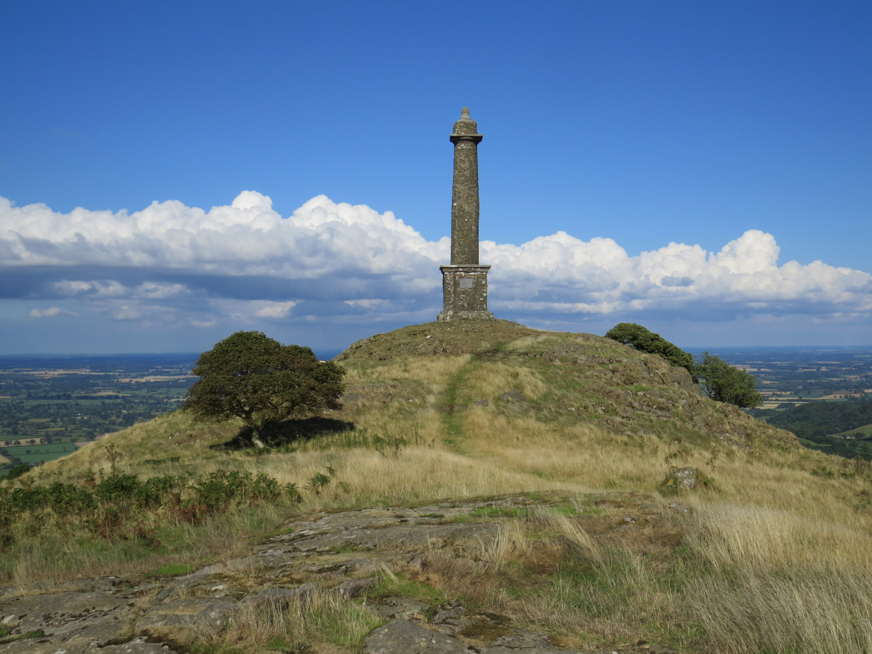 Pilar Rodney, Bryn Breiddin